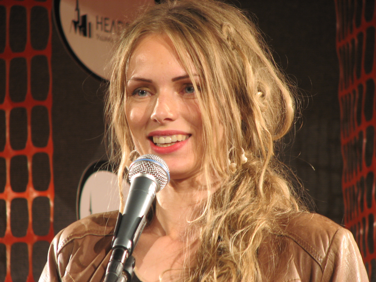 Kristiina Ehin esitamas oma loomingut kirjandusfestivalil HeadRead 2011